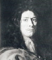 Henrik Meurman, sidenhandlare i Stockholm